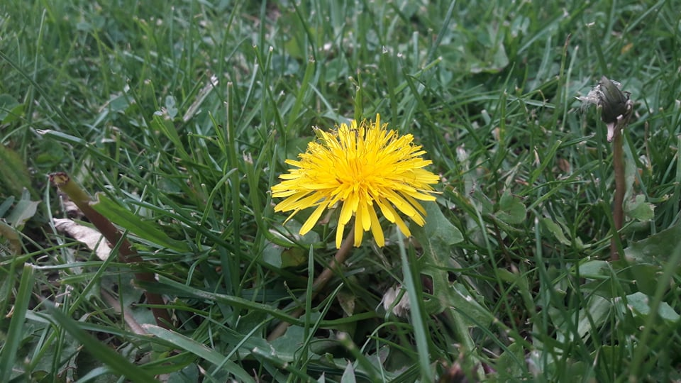 Lule rradhiqe